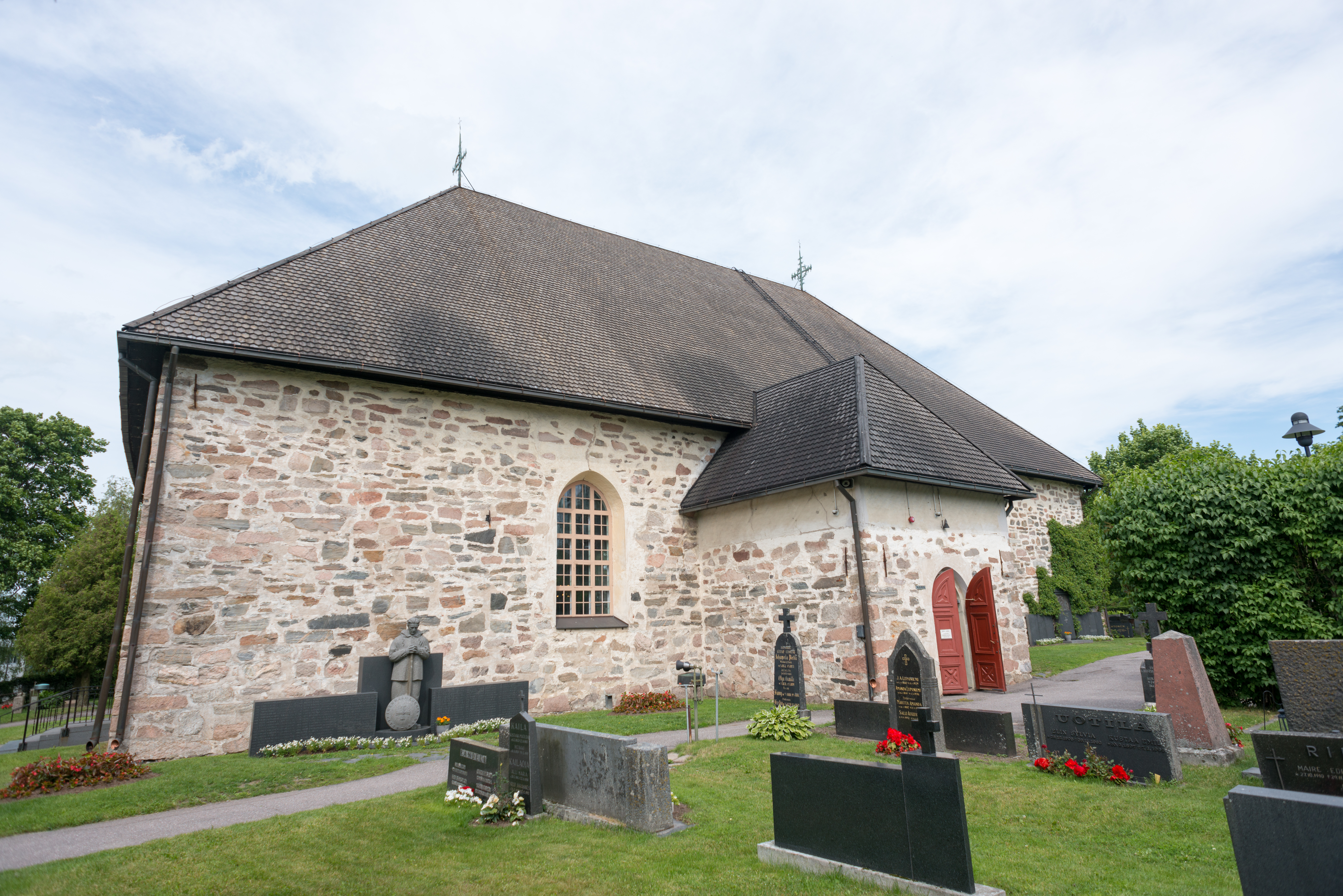 Pyhän Mikaelin kirkko Paimiossa